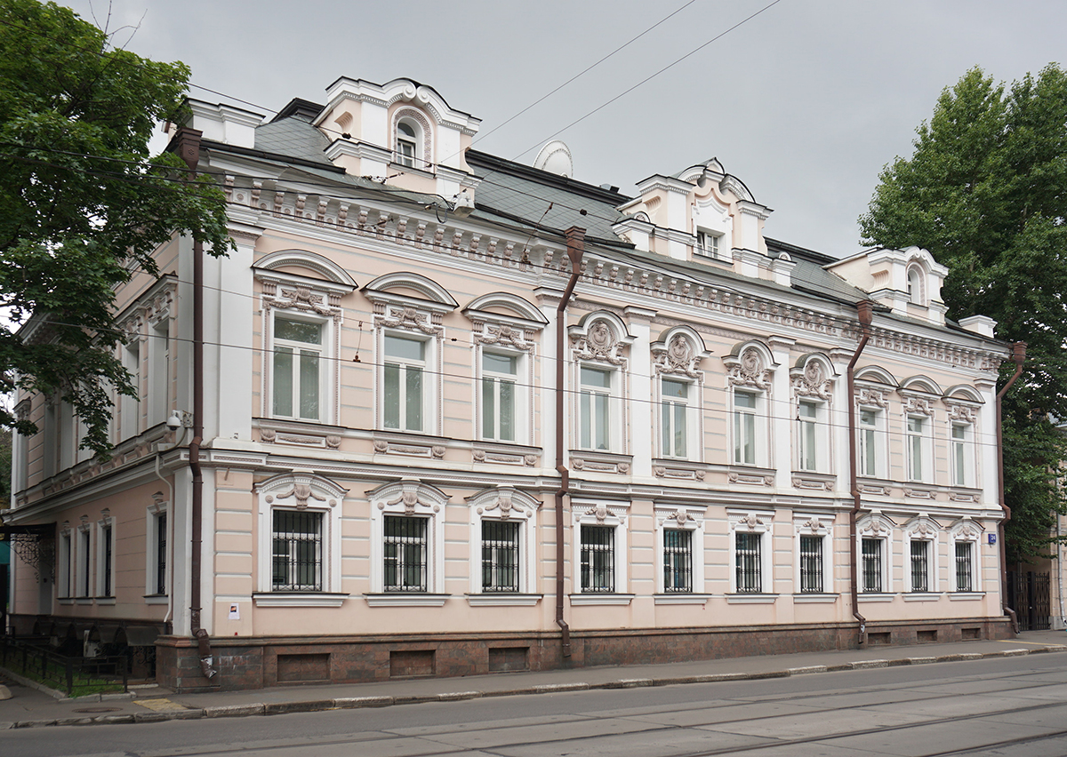 Городская усадьба Толоконниковых: Новокузнецкая ул., дом 24, строение 1, Замоскворечье, Центральный округ, Москва